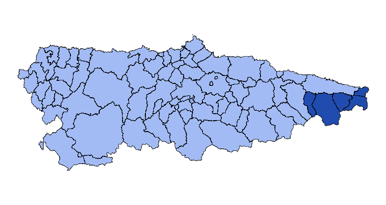 Concejos que forman la mancomunidad asturiana de Concejos de la Zona Suroriental de Asturias